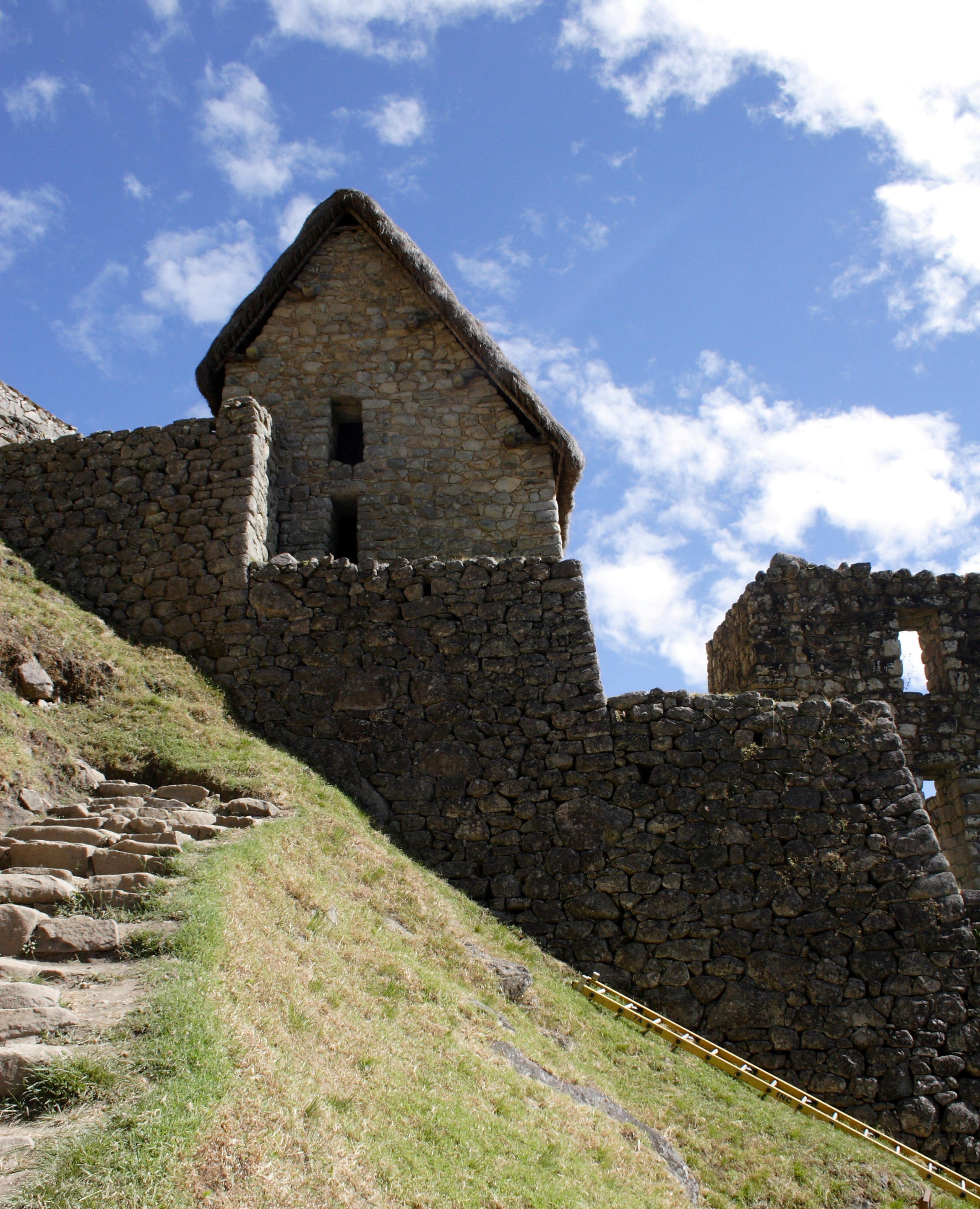 Machu Picchu - Guardhouse